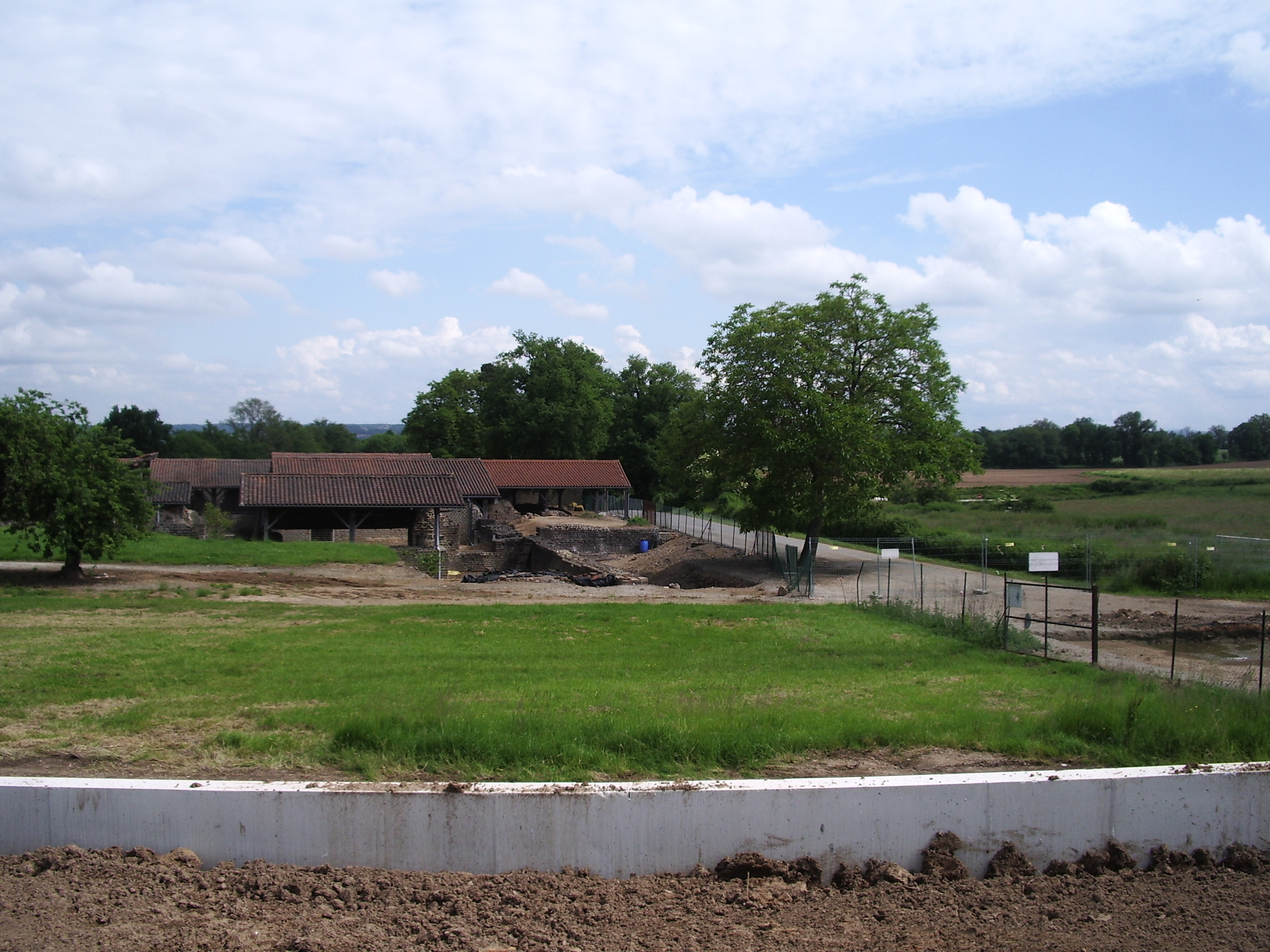 thermes gallo-romains de Chassenon à Cassinomagus, commune de Chassenon, Charente, France S-O. Vue vers le nord. Le nouveau bâtiment d'accueil, en construction, est immédiatement à notre droite. .